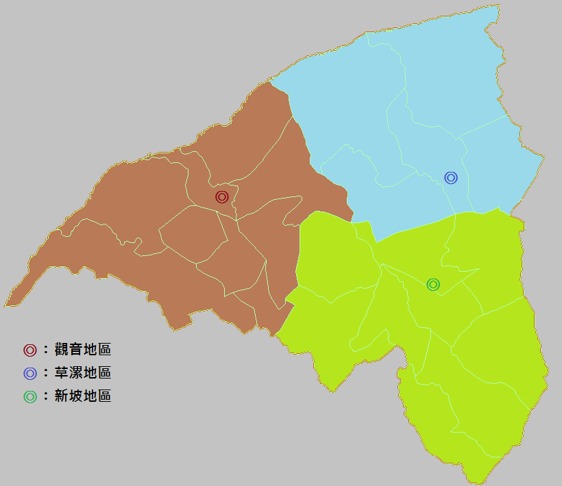 中文（台灣）: 觀音鄉次分區圖。